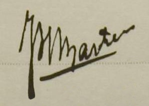 Подпись Йопа Мартенса